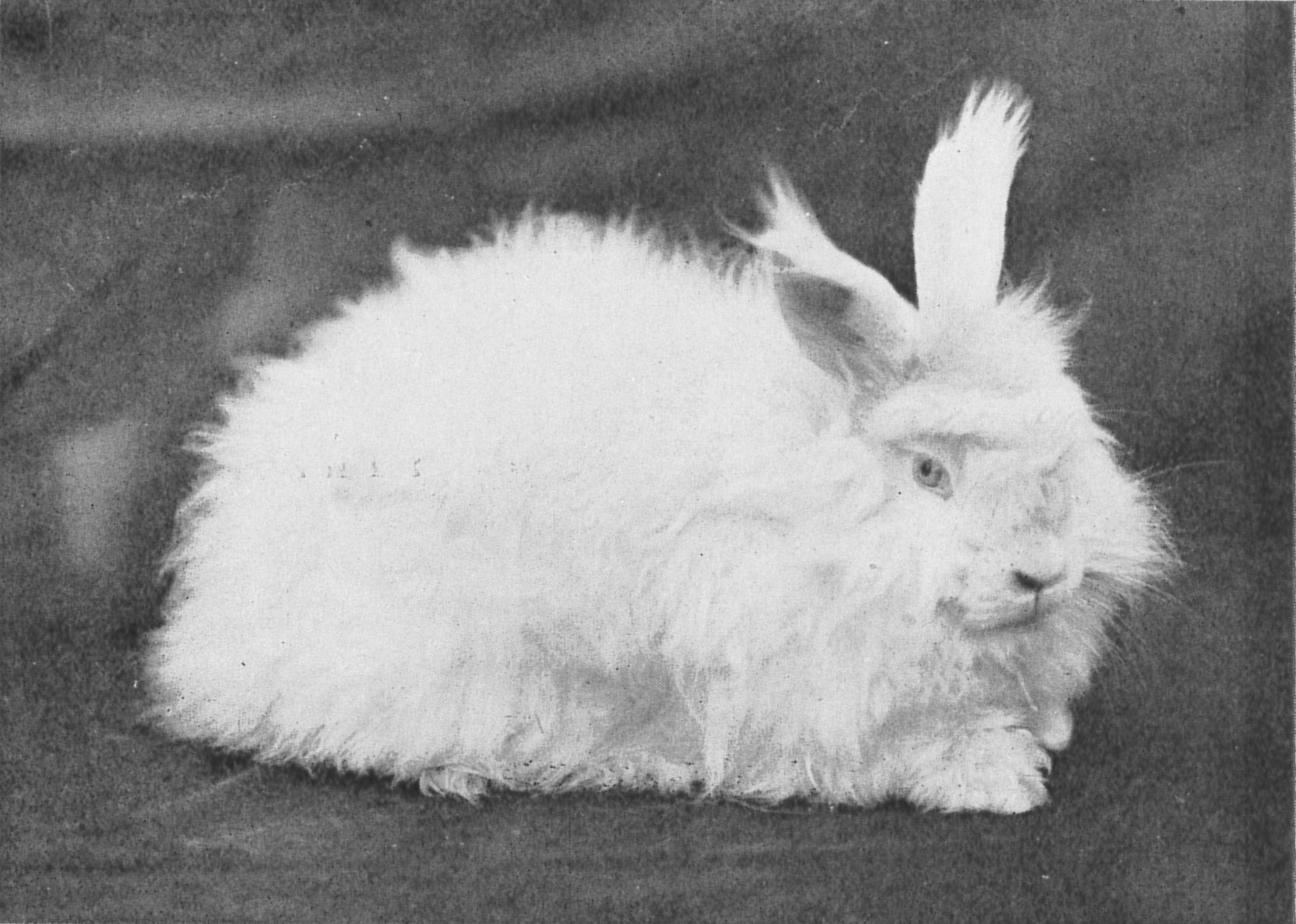 農林省畜産試験場輸入イギリス系アンゴラ雌